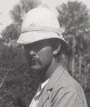 Gustaf von Hofsten